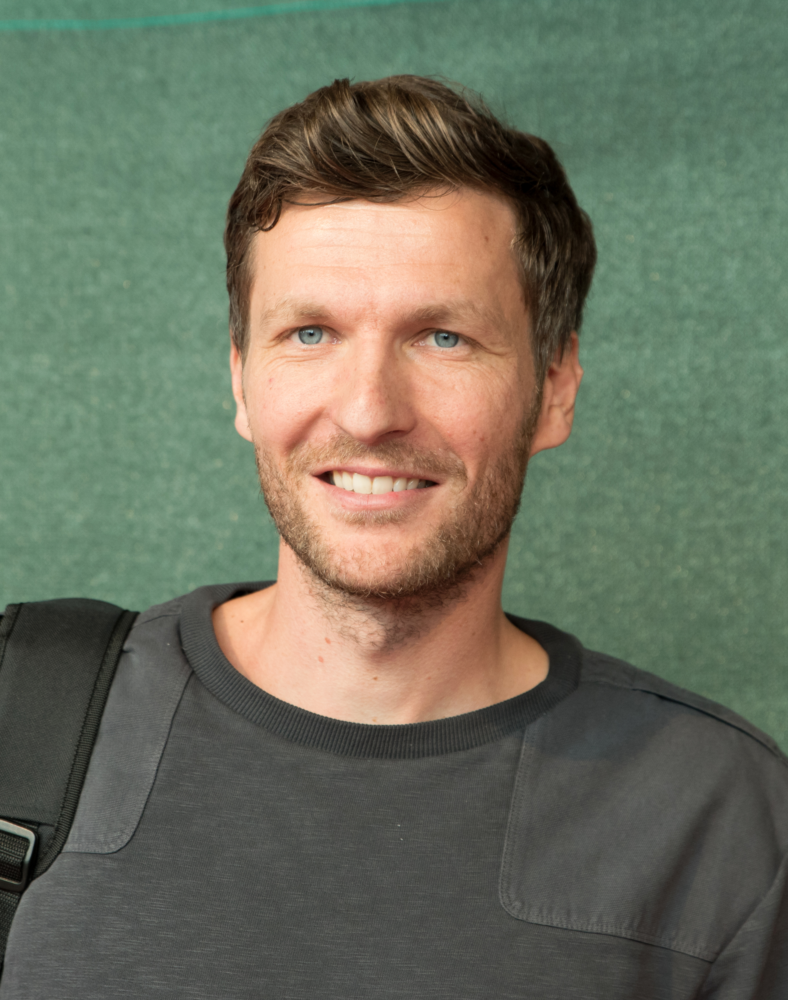 Benjamin Lauth beim Tag der Legenden 2016